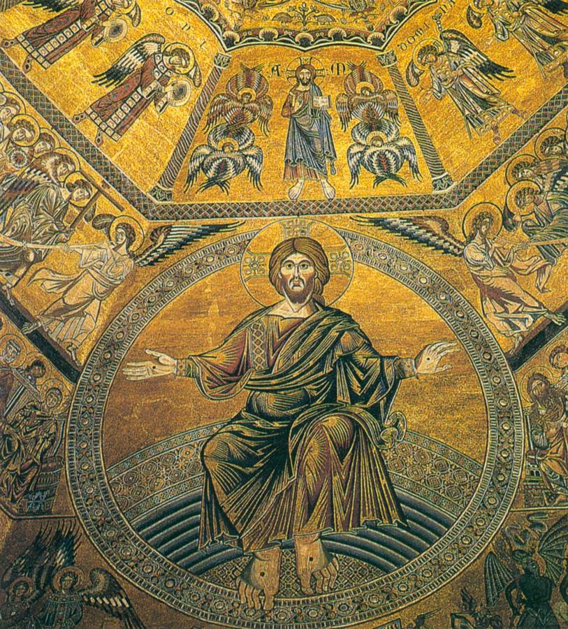 detail